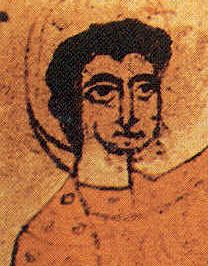 Miniatura de la primera mitad del siglo XII que representa a Sancho Ramírez de Aragón y a su padre Ramiro I de Aragón (con barba)